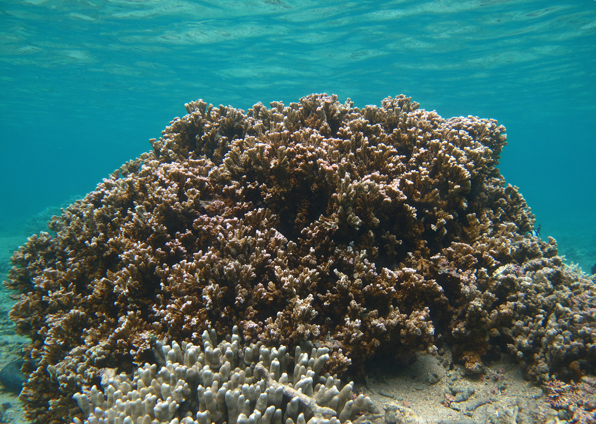 Montipora circumvallata à la Réunion.